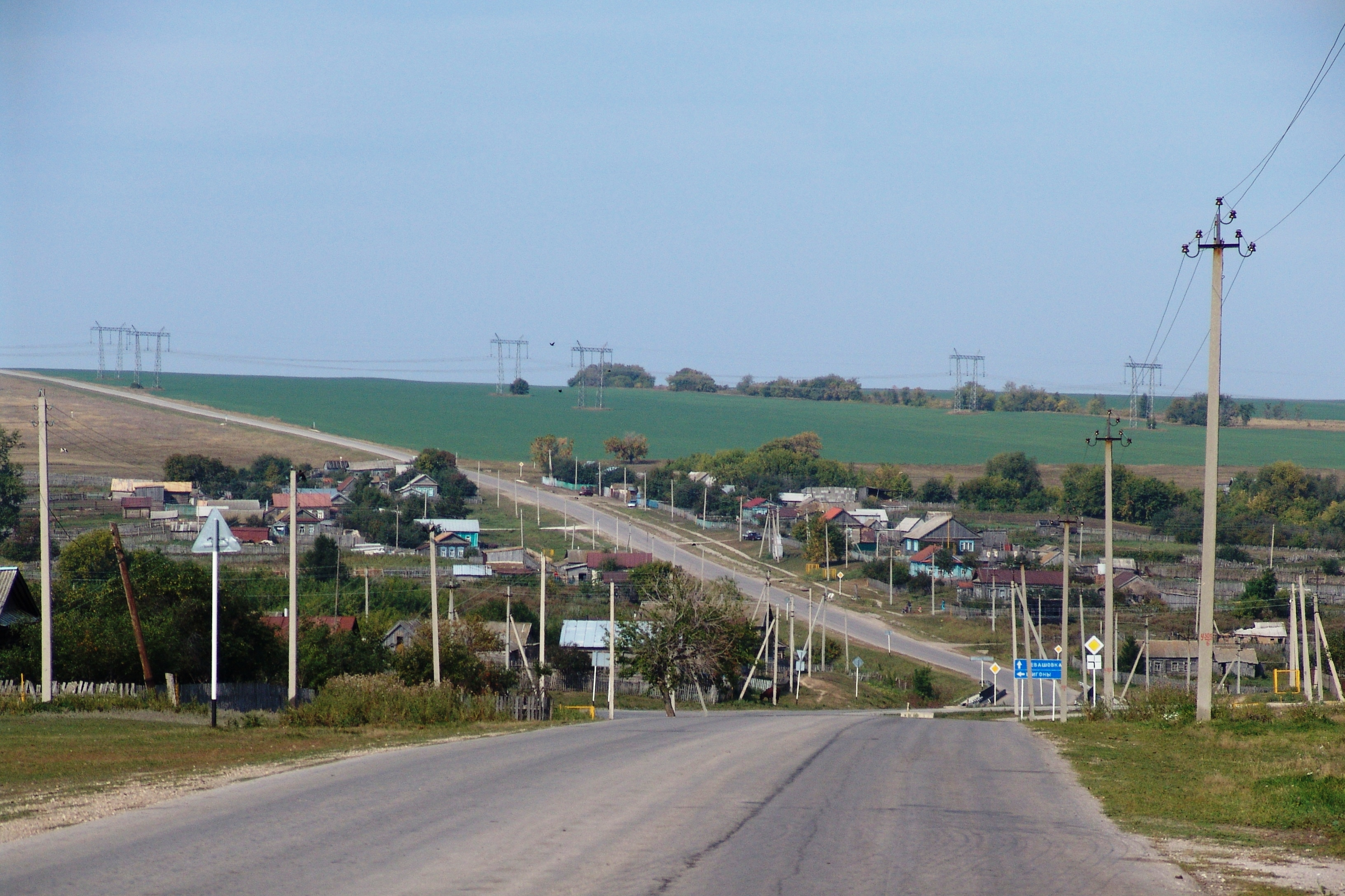 Тайдаково, дорога.